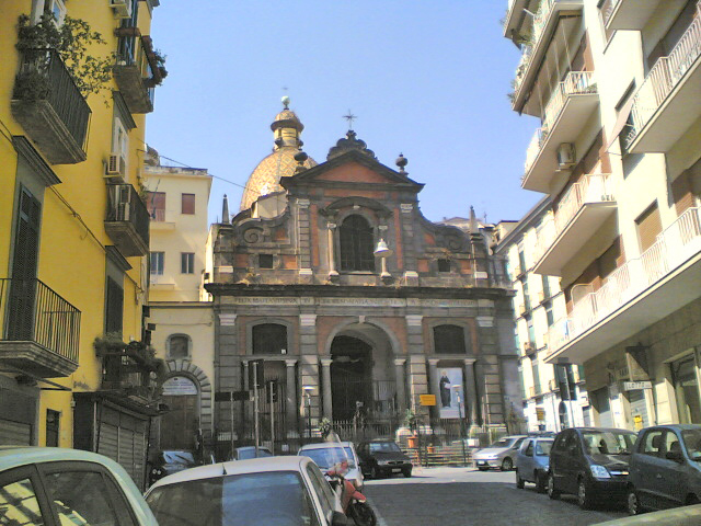 Facciata della di Santa Maria in Portico, Napoli